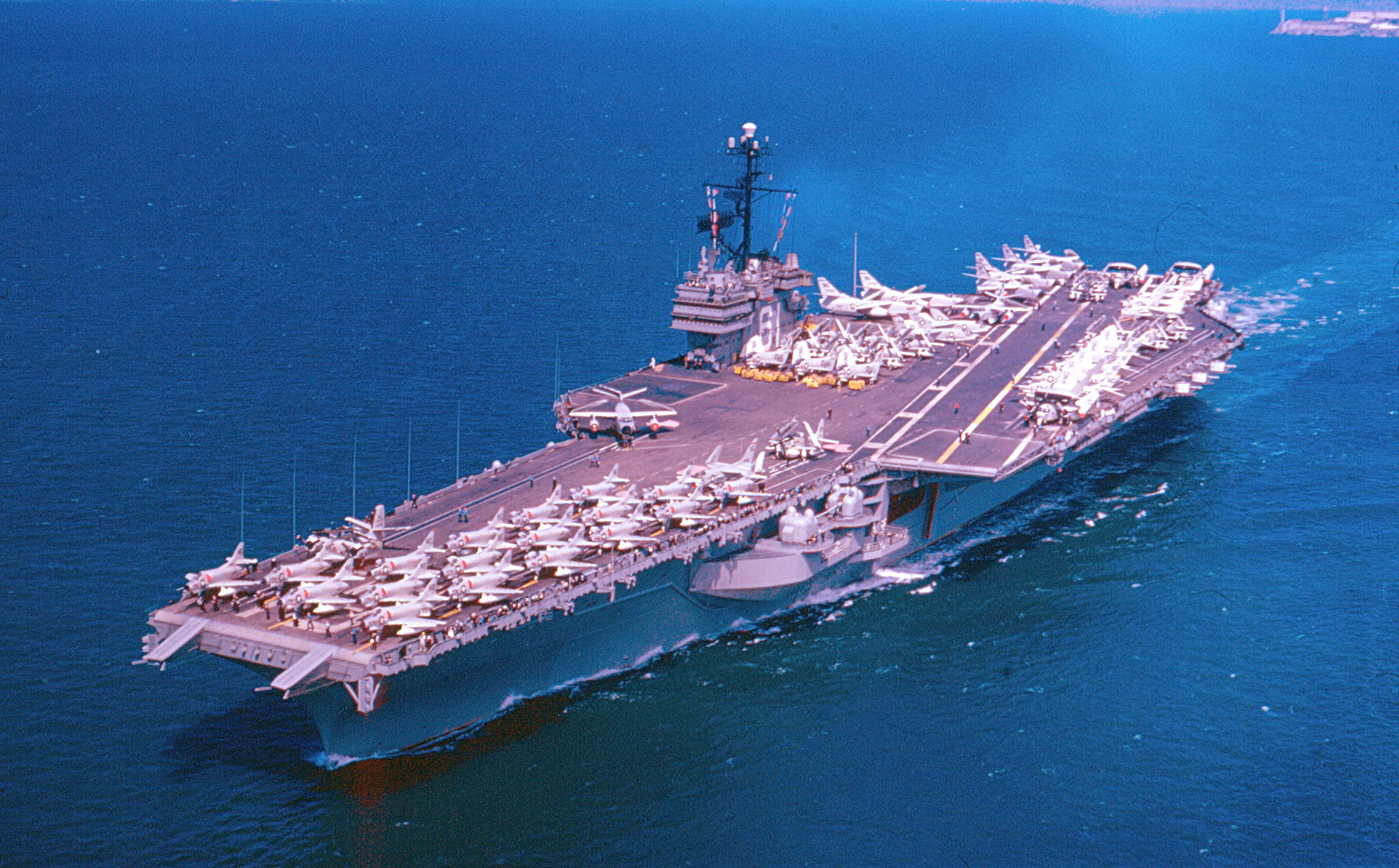 USS RANGER august 1961